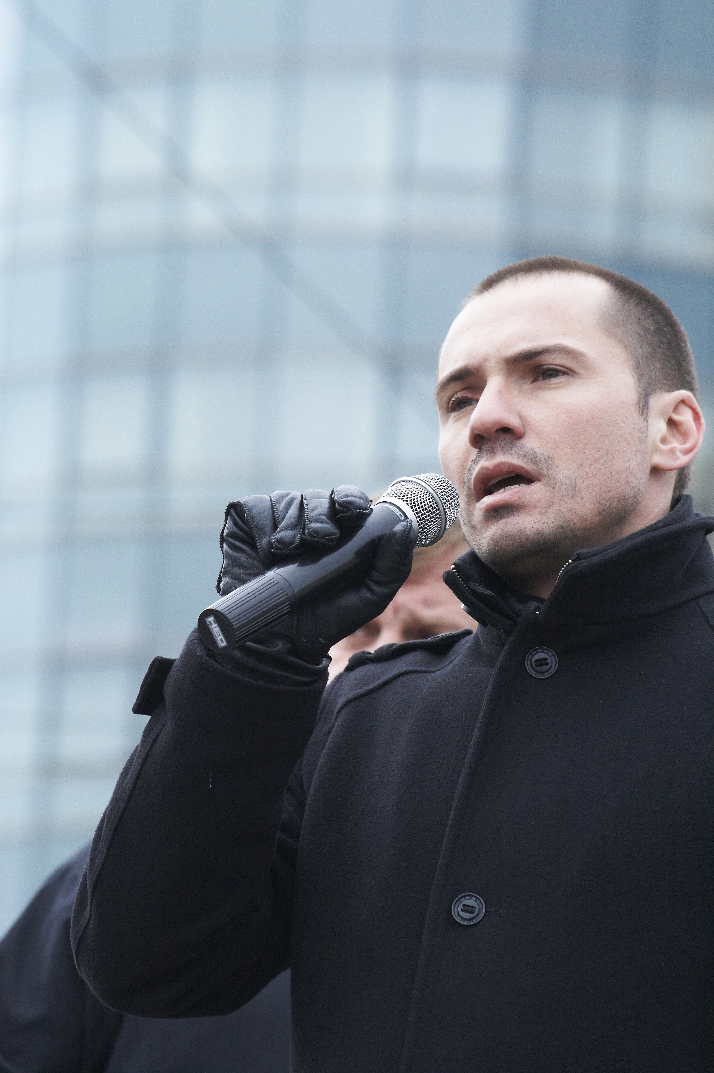 ᨅᨔ ᨕᨘᨁᨗ: Ангел Джамбазки, ВМРО